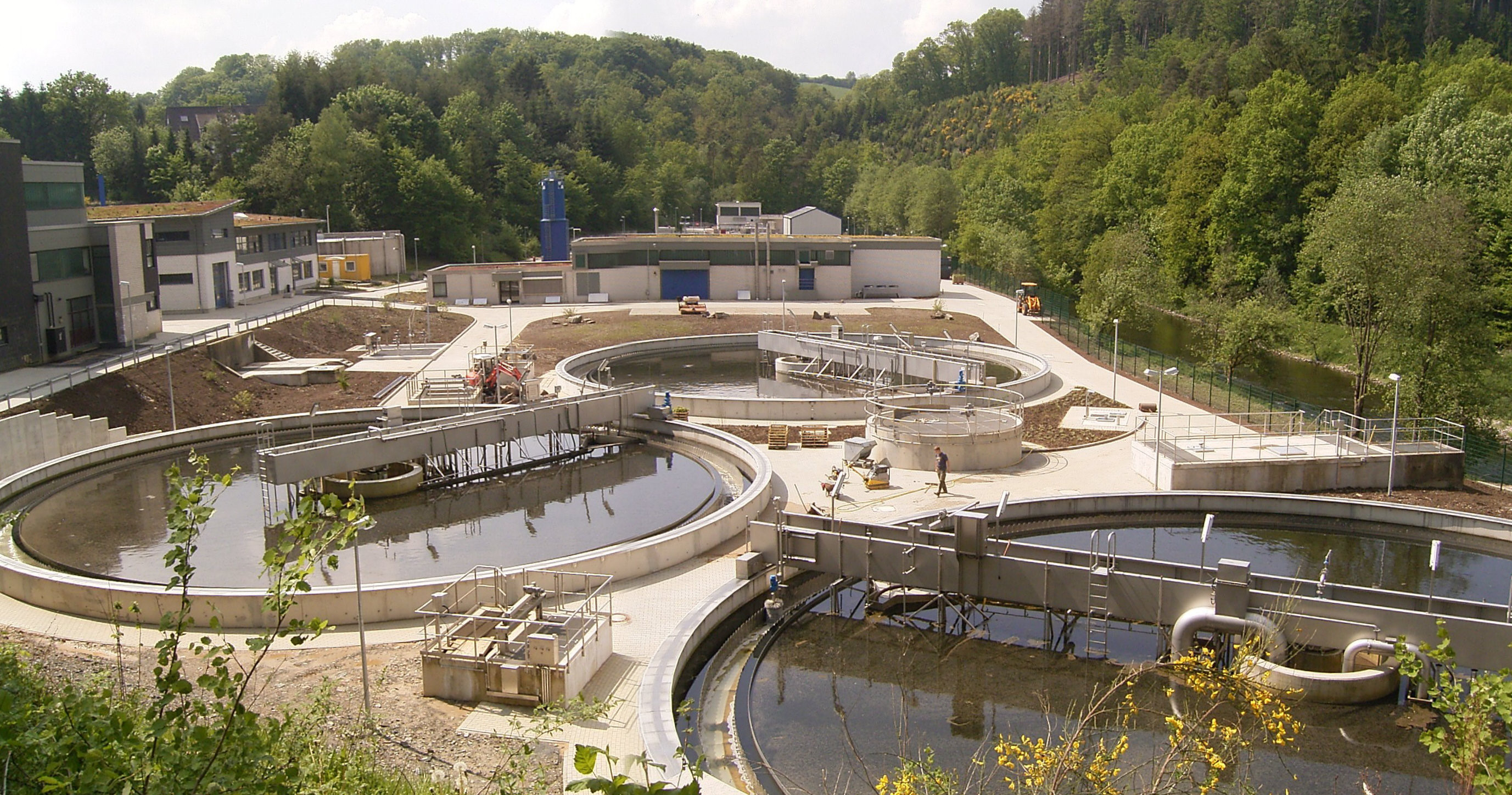 Klärwerk des Wupperverbandes in Radevormwald